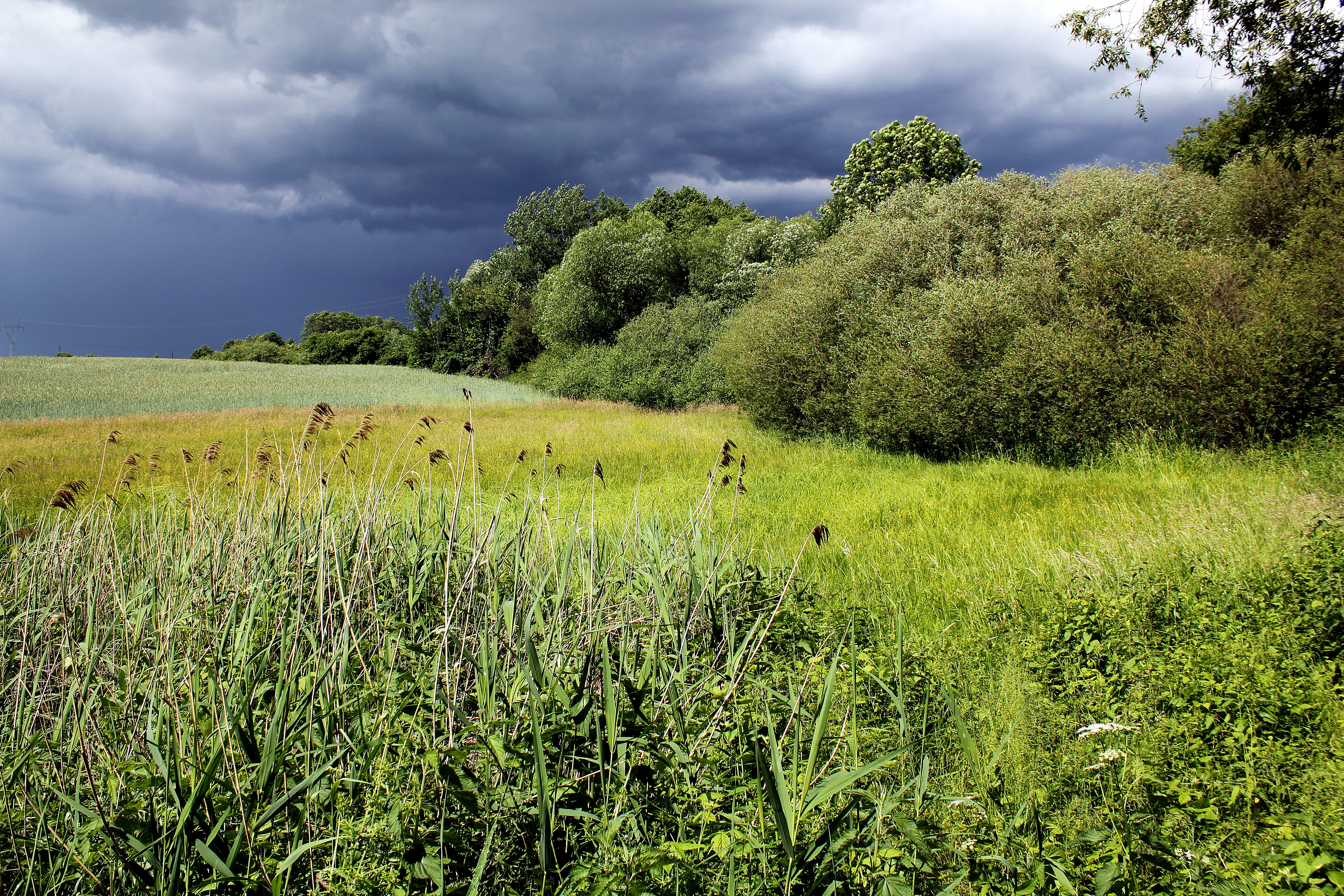 Zarośnięte oczko wodne na Pojezierzu Wielkopolskim jako przykład procesu starzenia się zbiorników wodnych